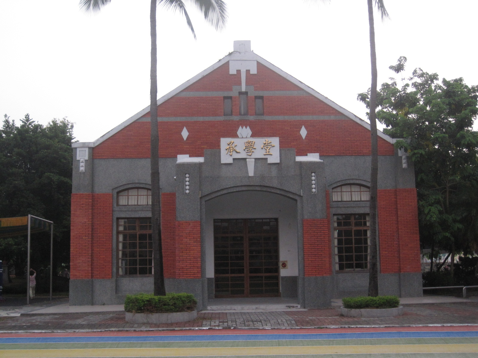 中文（台灣）: 草屯國小禮堂。